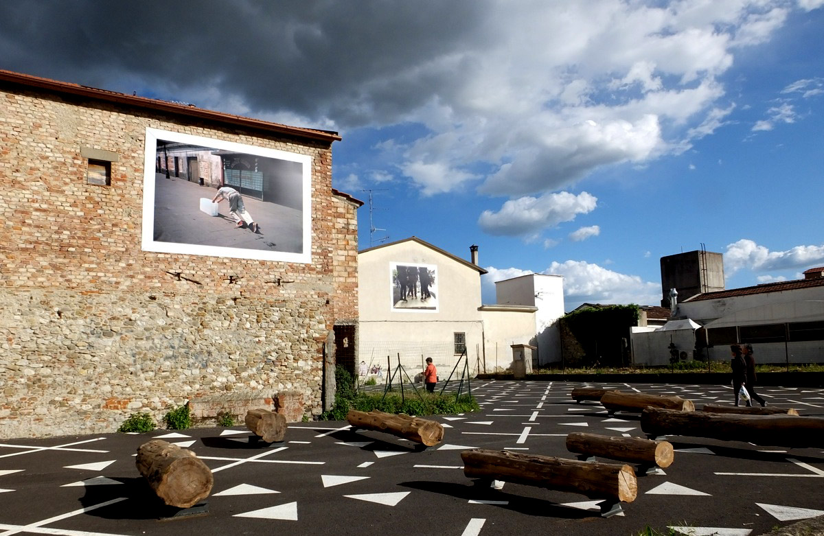 Piazza 5 Marzo Prato